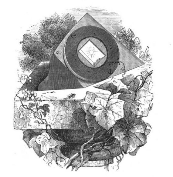 Dipleidoscopio de Edward John Dent (1790–1853) Imagen de su obra: Título A Description of the Dipleidoscope, Or Double-reflecting Meridian and Altitude Instrument: With Plain Instructions for the Method of Using it in the Correction of Time-keepers, Volumen 7 A Description of the Dipleidoscope, Or Double-reflecting Meridian and Altitude Instrument: With Plain Instructions for the Method of Using it in the Correction of Time-keepers, Edward John Dent Autor Edward John Dent Edición 8 Publicado en 1867 Procedencia del original Universidad de Oxford Digitalizado 6 Ene 2009 N.º de páginas 29 páginas